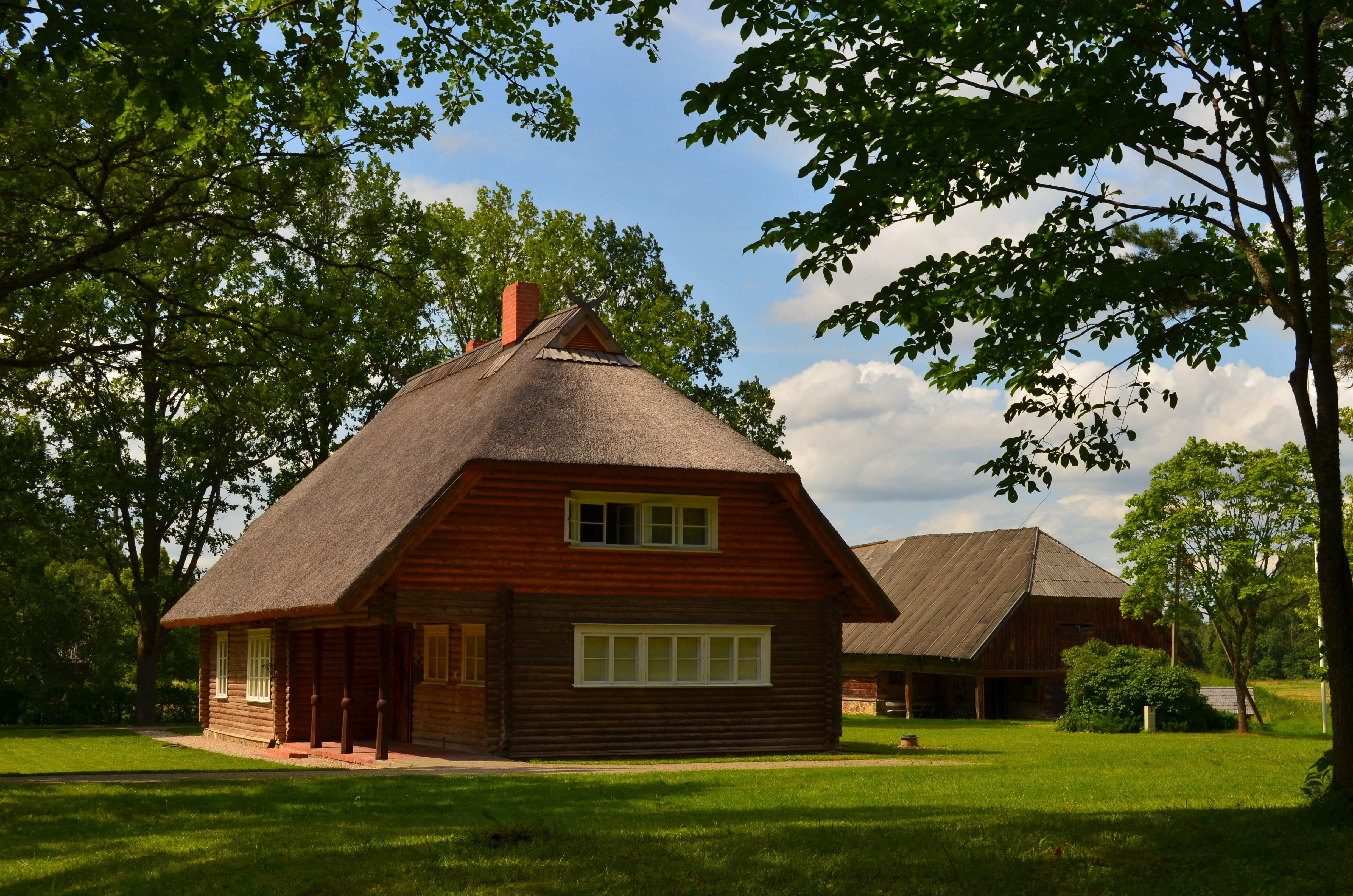 Oskara Kalpaka memoriāls "Airītes", Zirņu pagasts